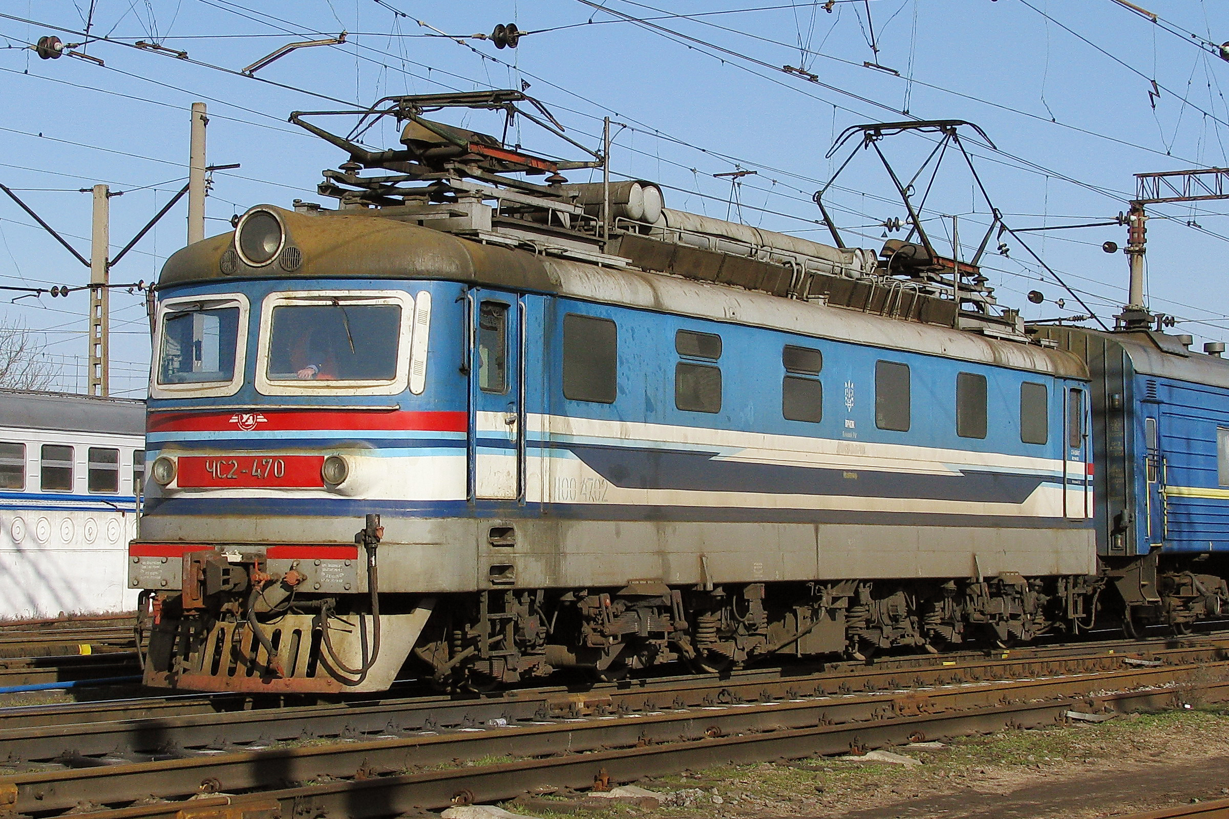 Электровоз ЧС2-470 на станции Никополь